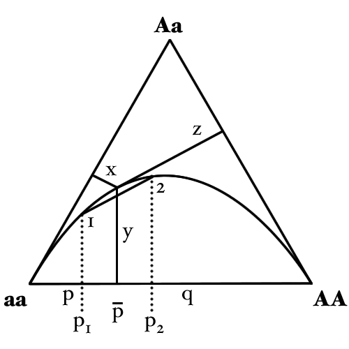 De Finetti diagram